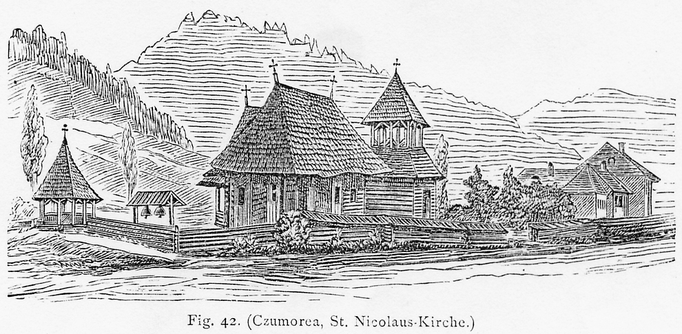 Biserica de lemn din Ciumârna, județul Suceava, schiță anterioară anului 1896 realizată de arhitectul Karl A. Romstorfer.